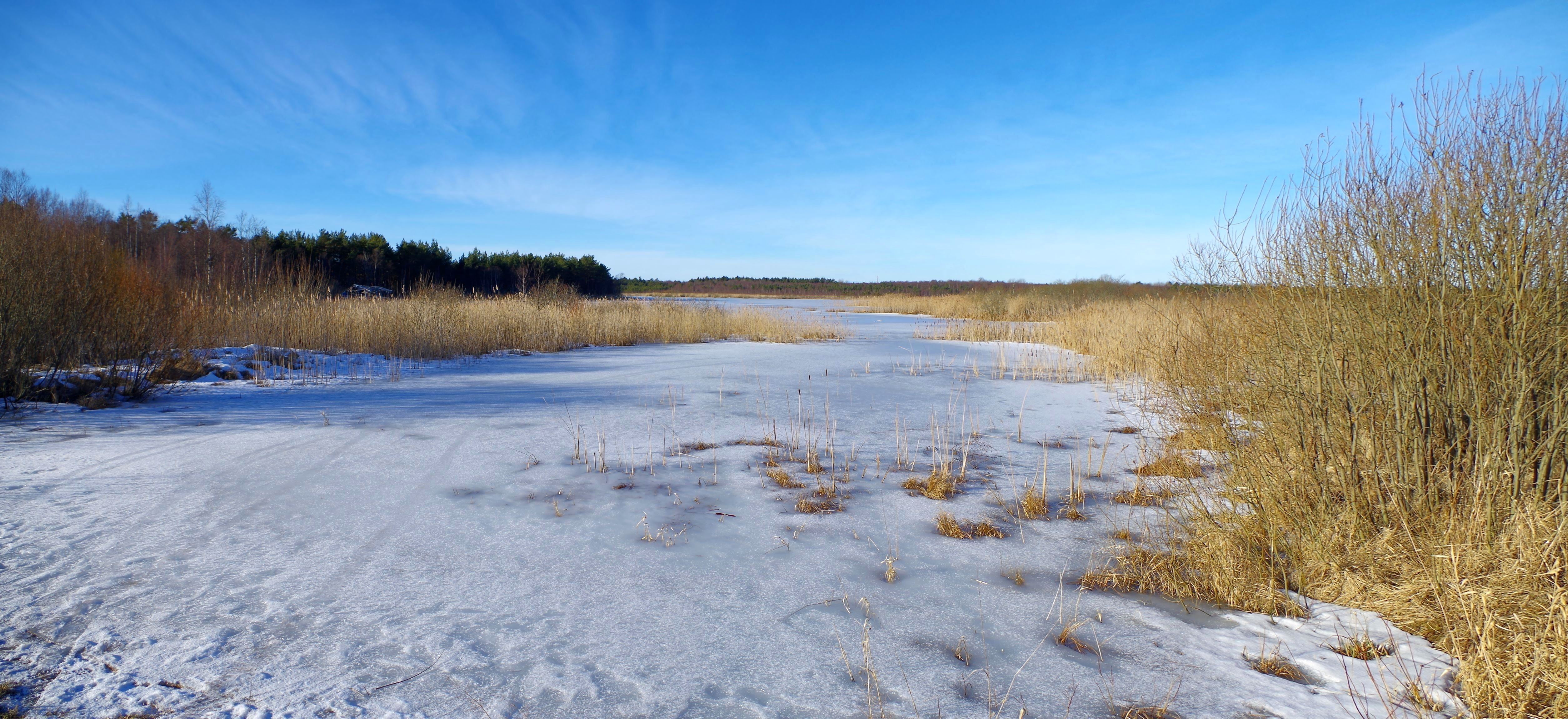 Vääna maastikukaitseala